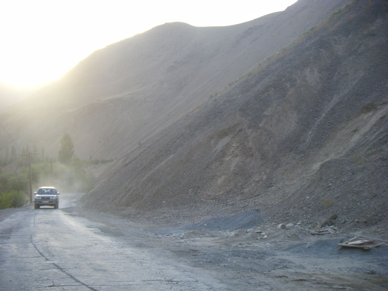 A377 between Penjikent and Dushanbe.